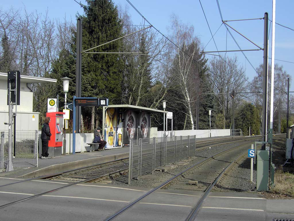 Stadtbahnhaltestelle Vilich in Bonn